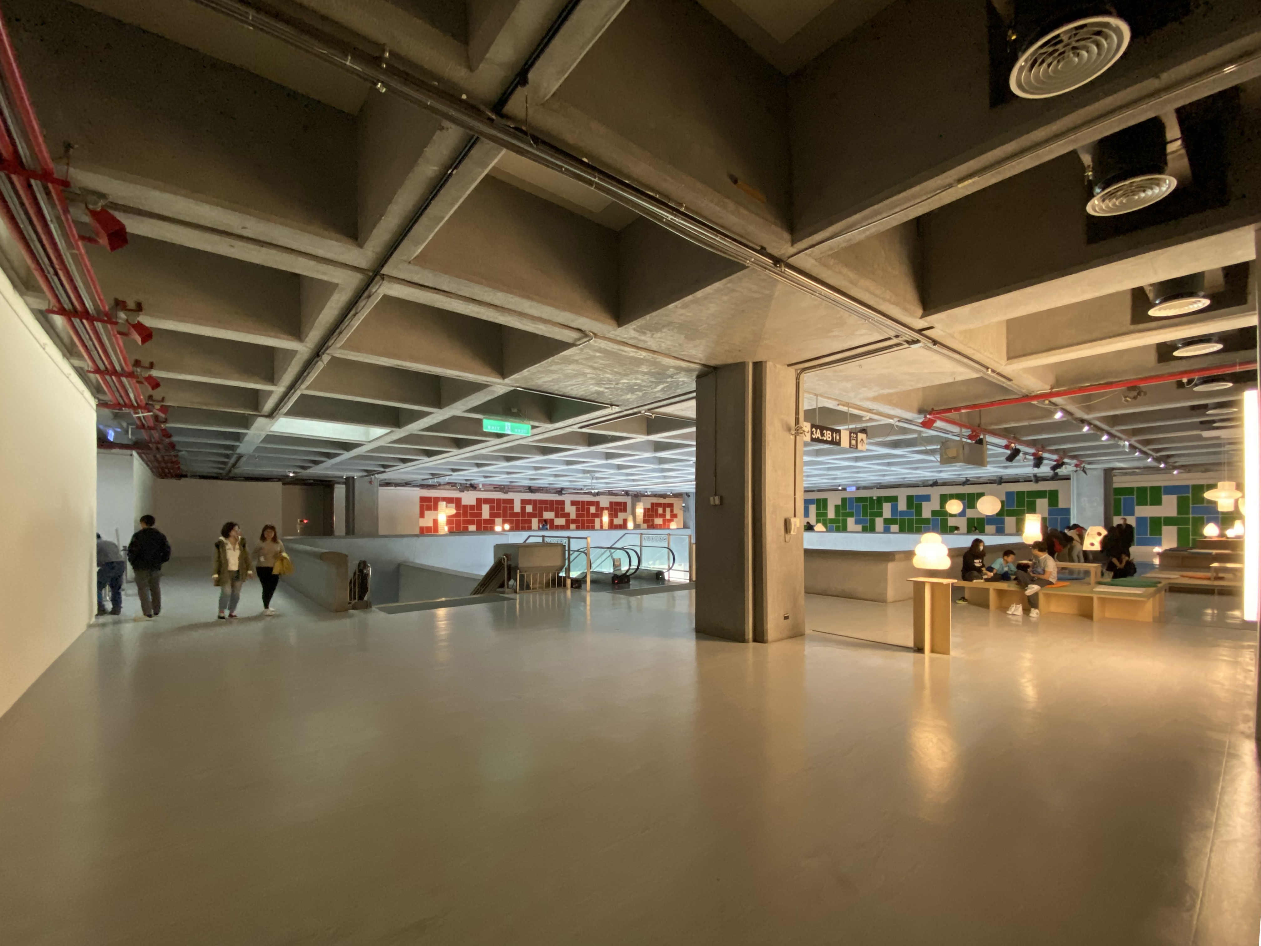 Taipei Fine Arts Museum Level 3